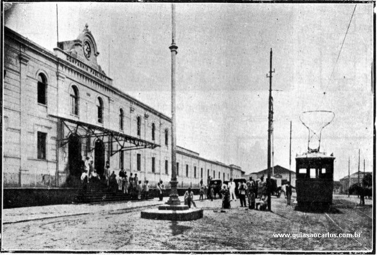 Estação da Cia. Paulista em São Carlos